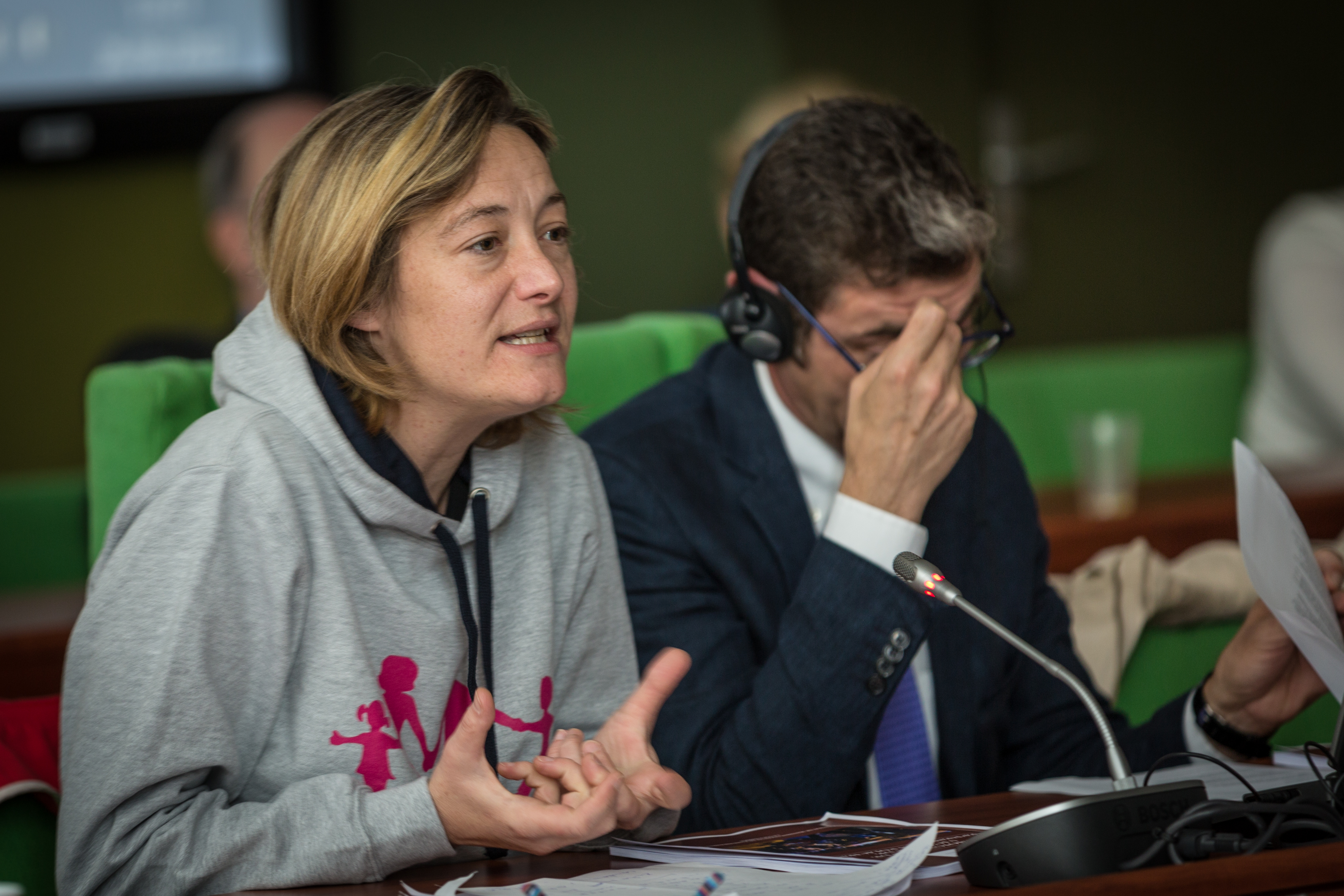 Manif pour tous et veillleurs à Strasbourg au Conseil de l’Europe le 26 juin 2013.